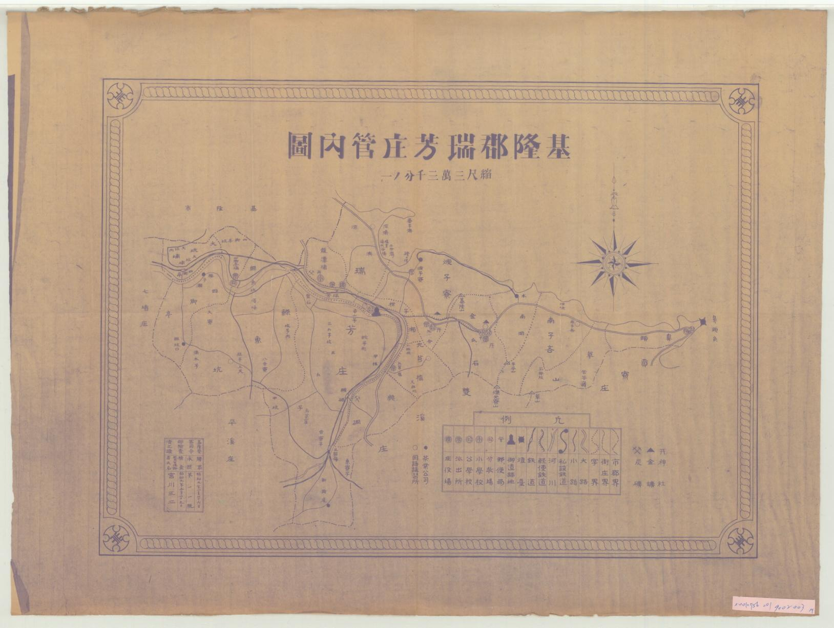 瑞芳庄為台灣日治時其行政區，隸屬台北州基隆郡。